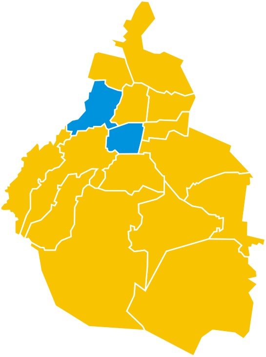 Resultados electorales por Delegación del Distrito Federal en 2006